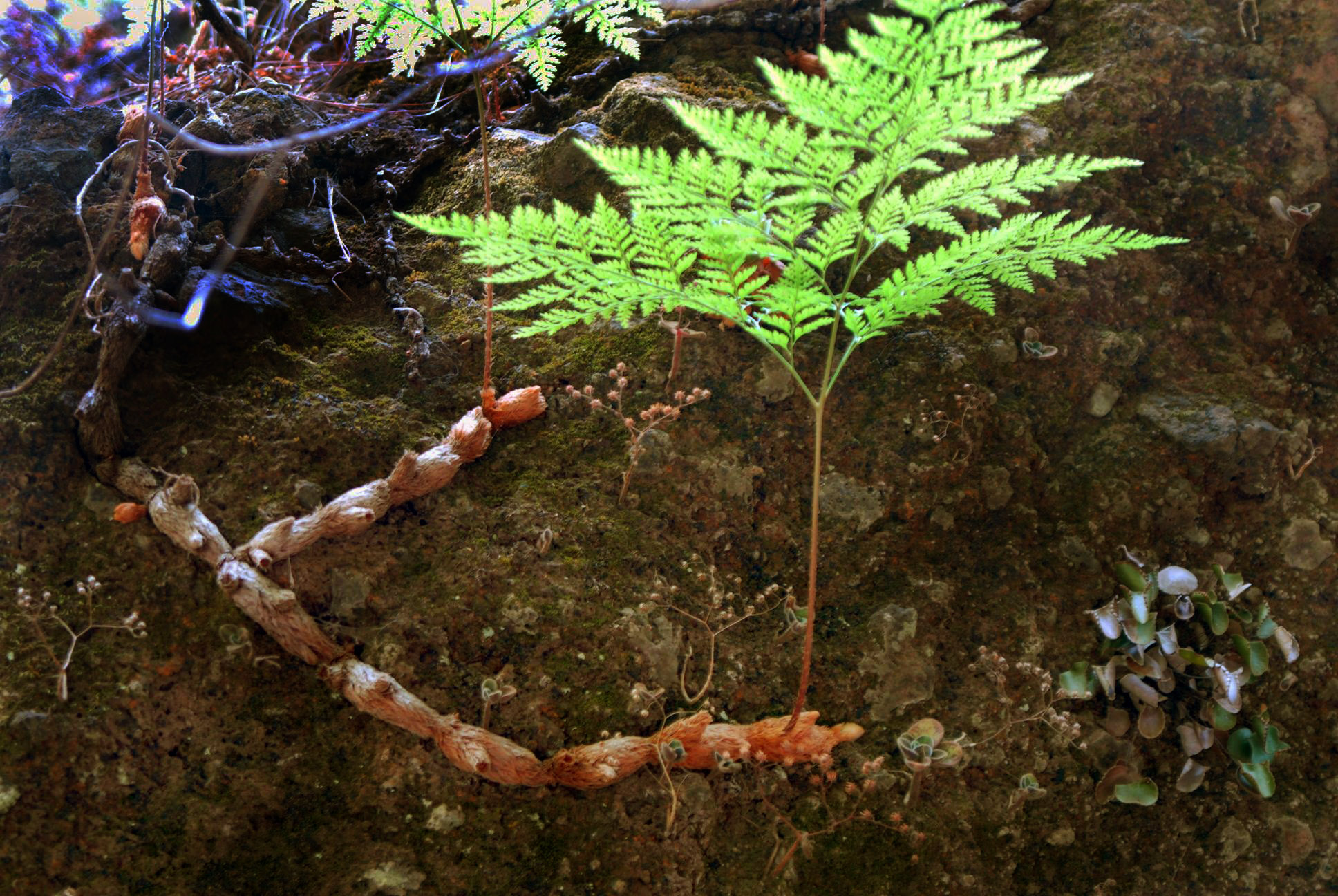 fougère épilitheDavallia canariensis